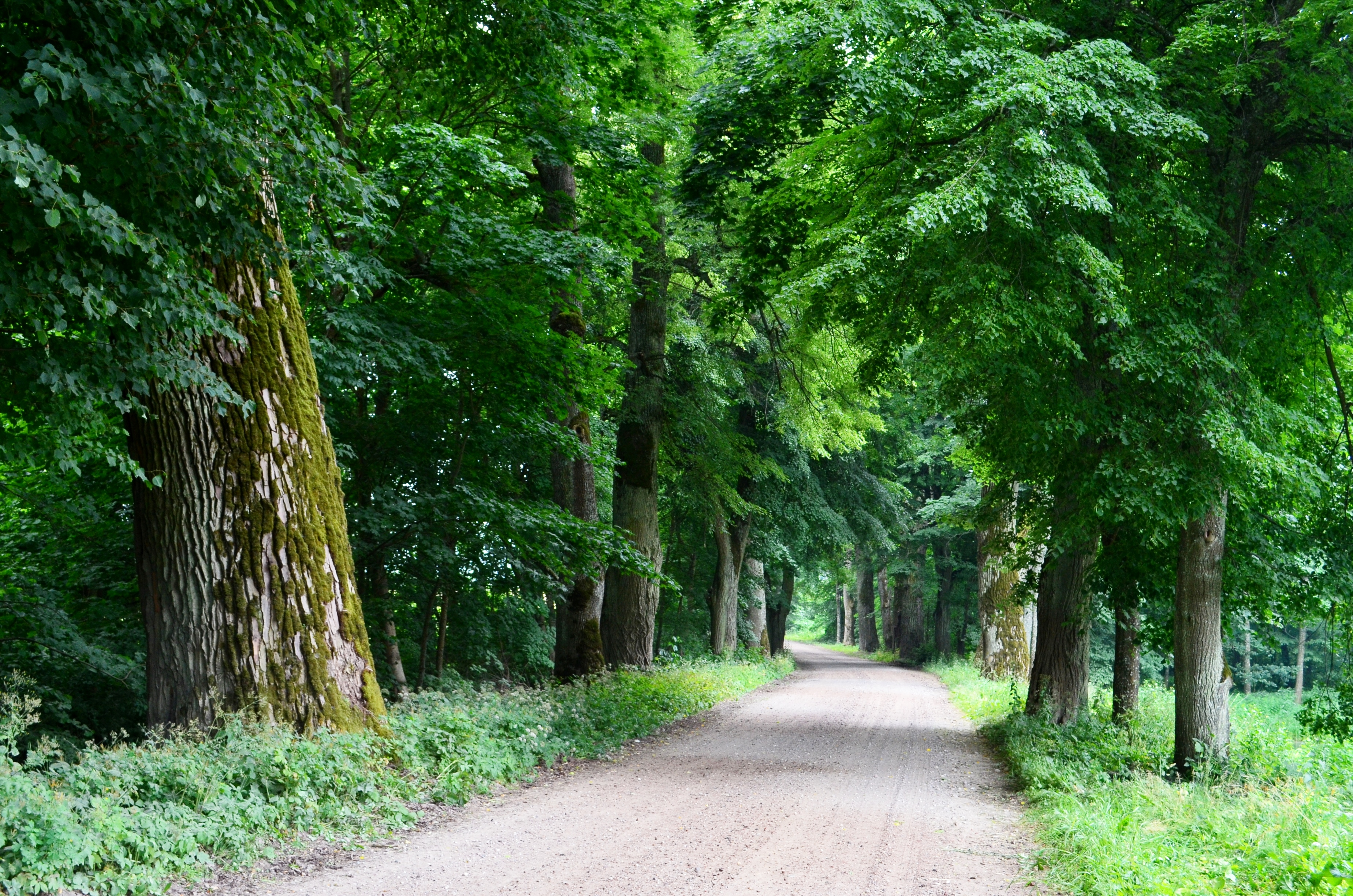 Medžių alėja prie kelio į Šereitlaukį, Pagėgių sav.